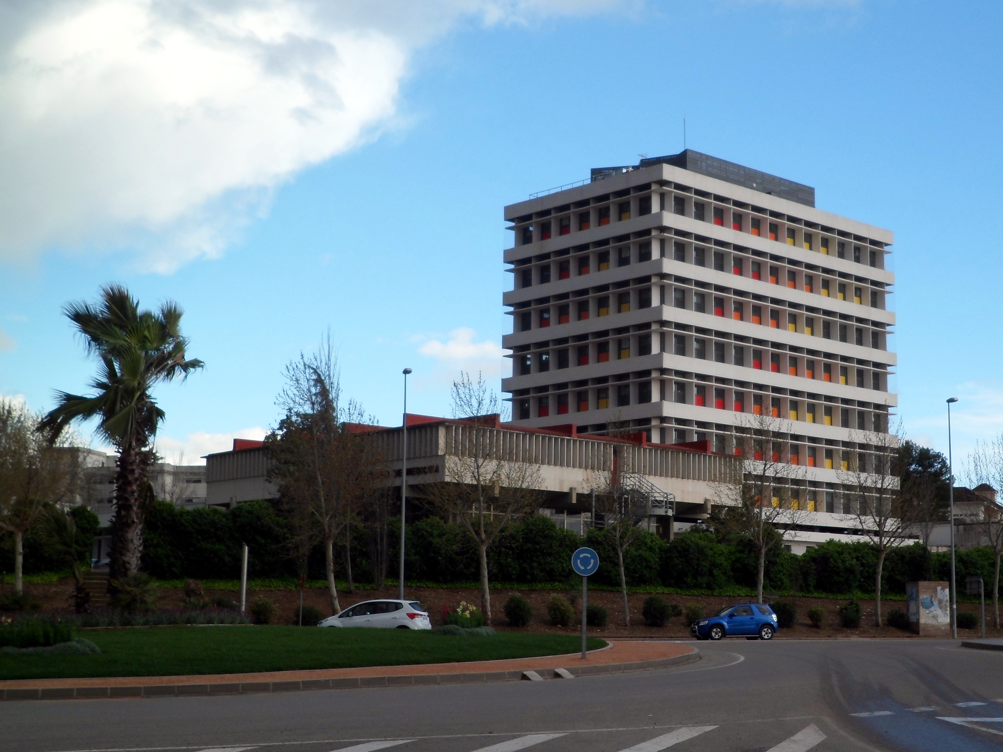 Facultad de Medicina de la Universidad de Córdoba (España).